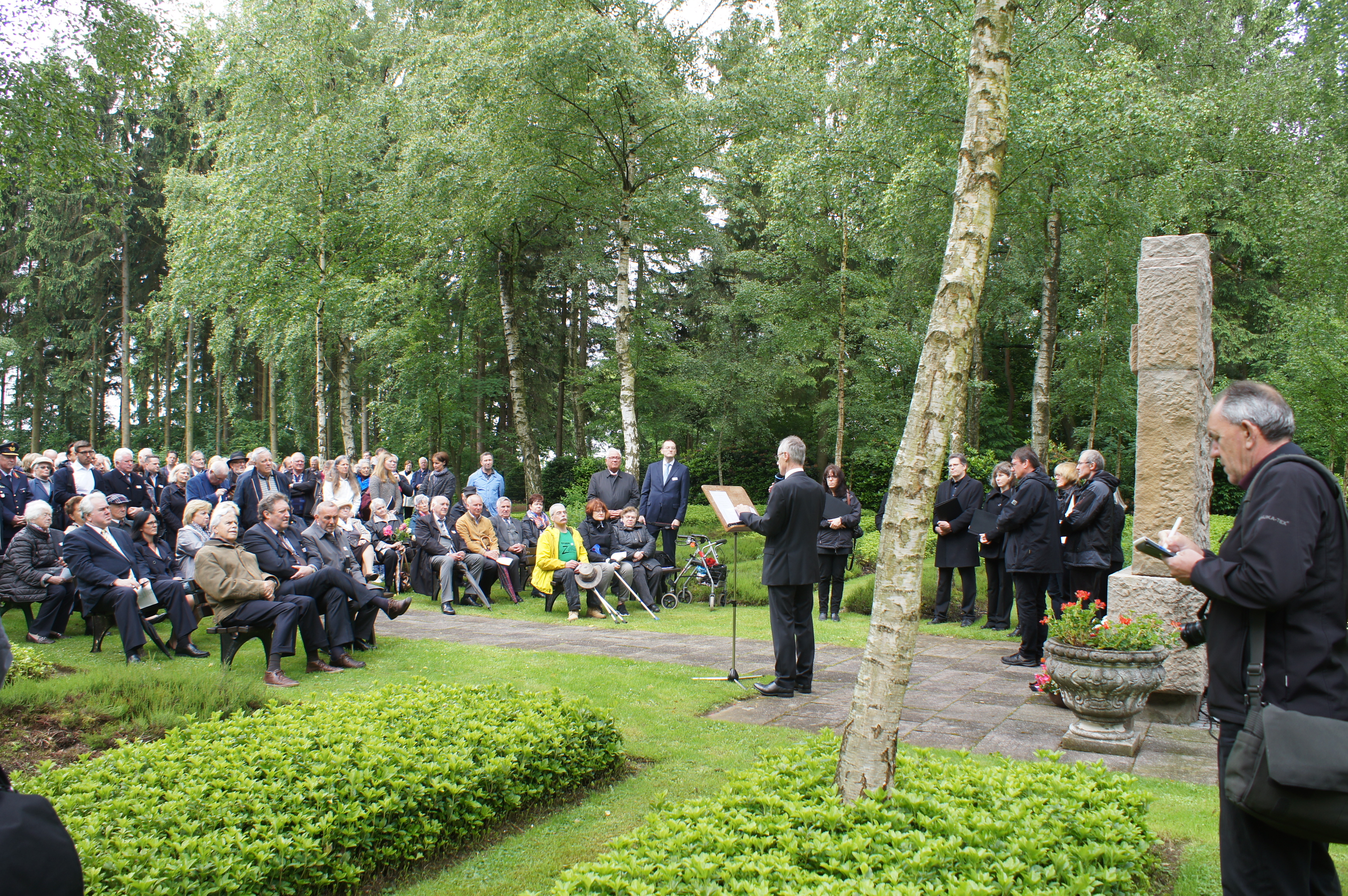 Granitstelen Russengräber Kesternich Rurberg Einweihung